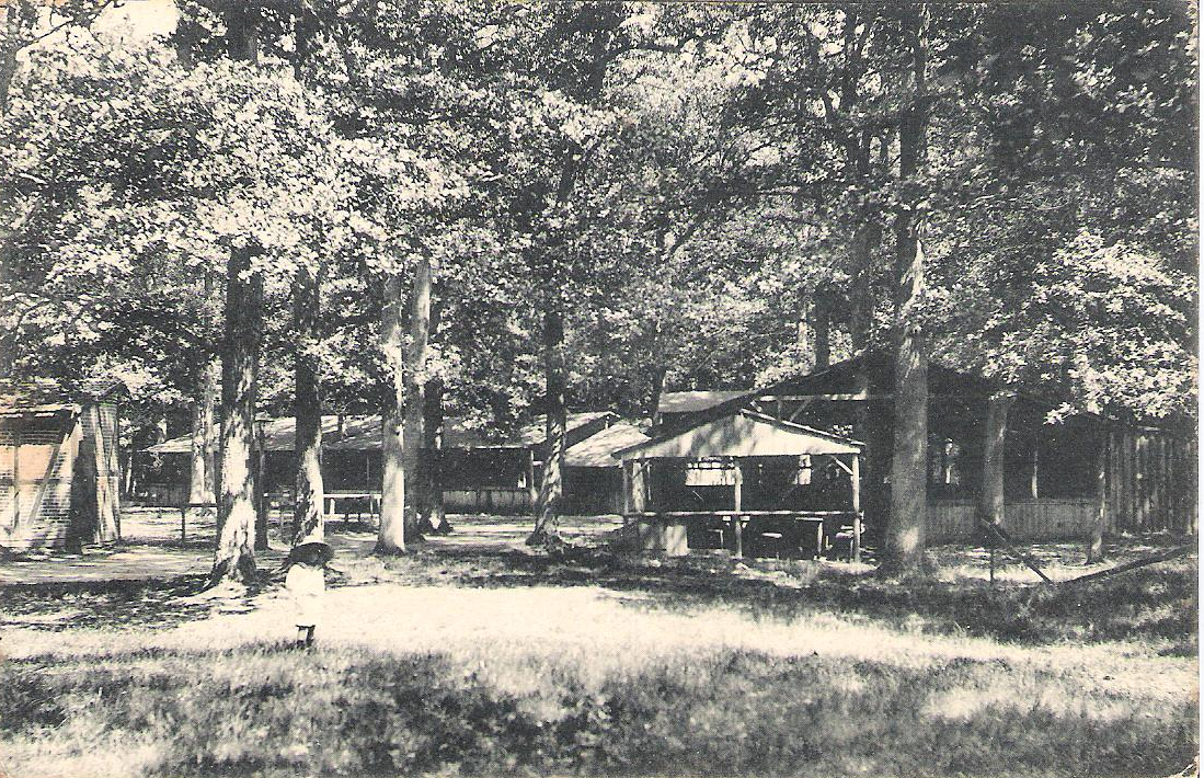 Calvörde Forstort Grieps, Postkarte gestempelt 06.02.1918